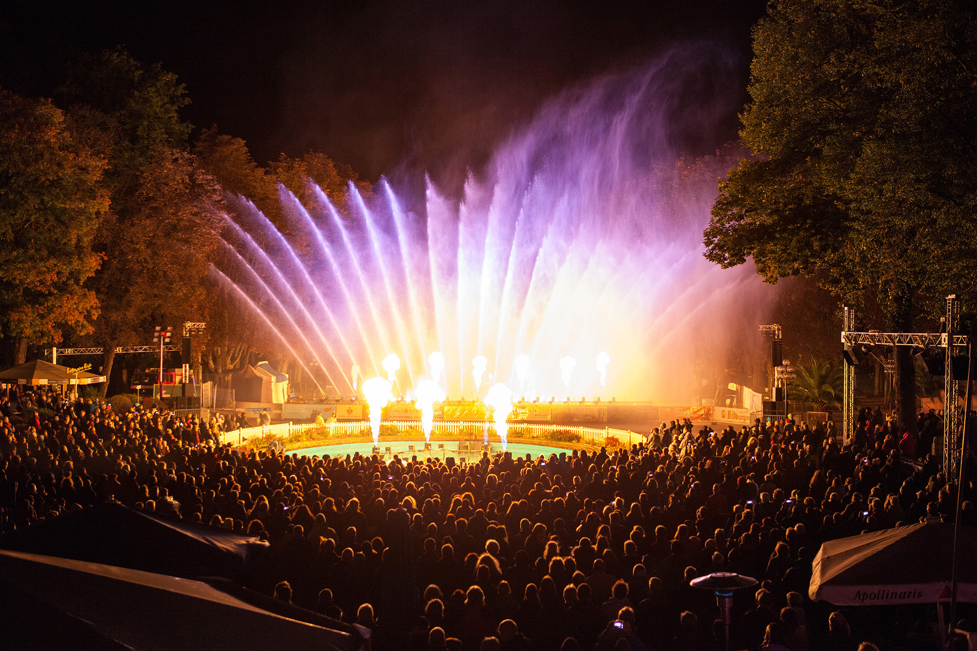 Das Bild zeigt die Klangwelle 2017 im Kurpark Bad Neuenahr. Es sind Wasser-, Licht- und Feuereffekte auf der Hauptbühne ersichtlich sowie die seit 2017 im Brunnen installierten Flammenprojektoren.